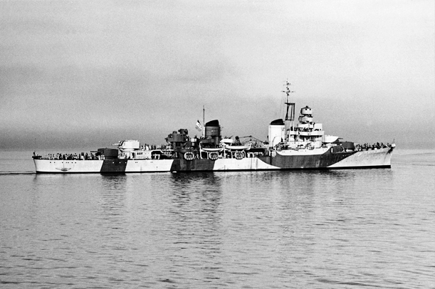 L'incrociatore Pompeo Magno in navigazione